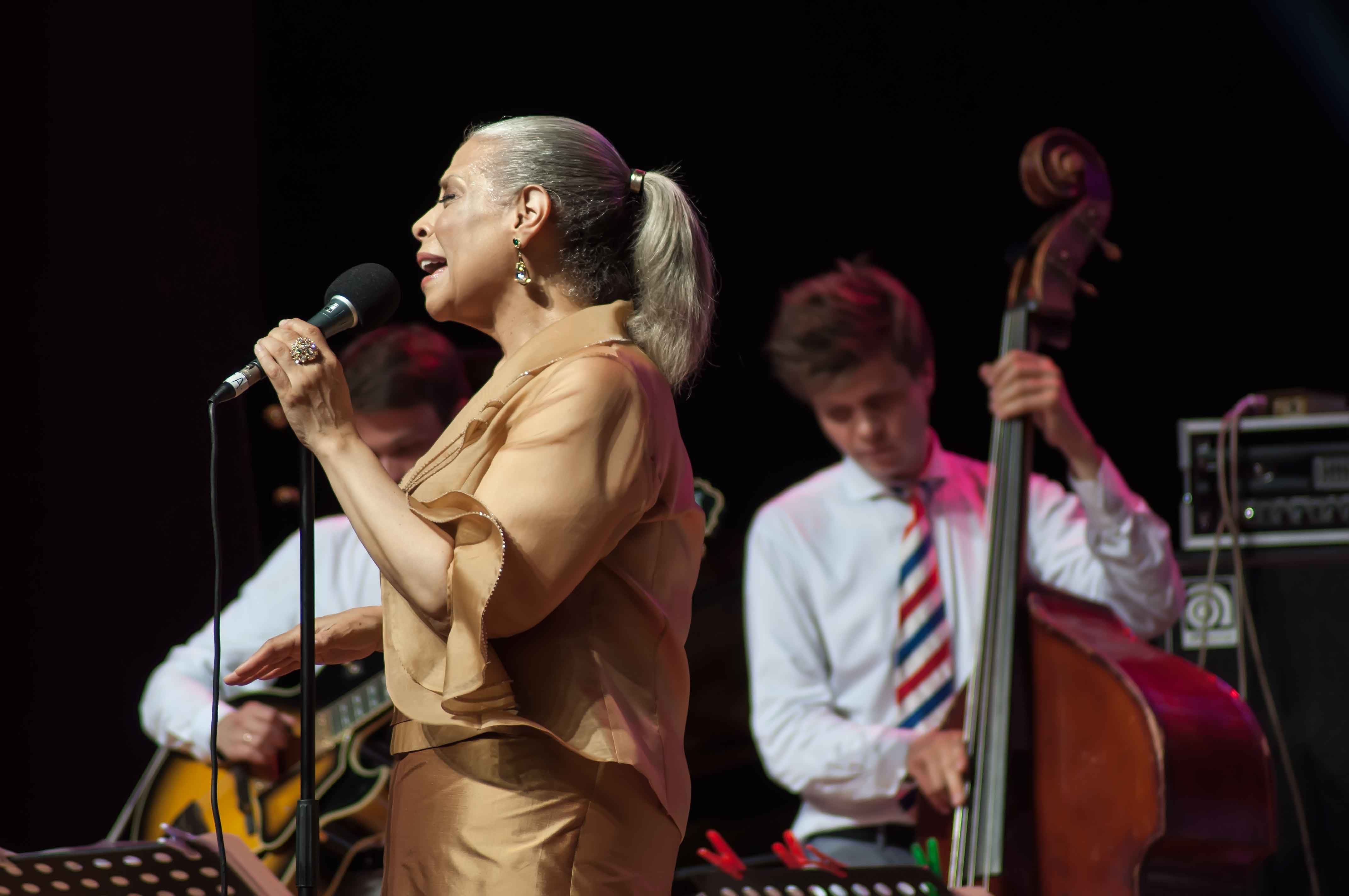 Sochi Jazz Fastival